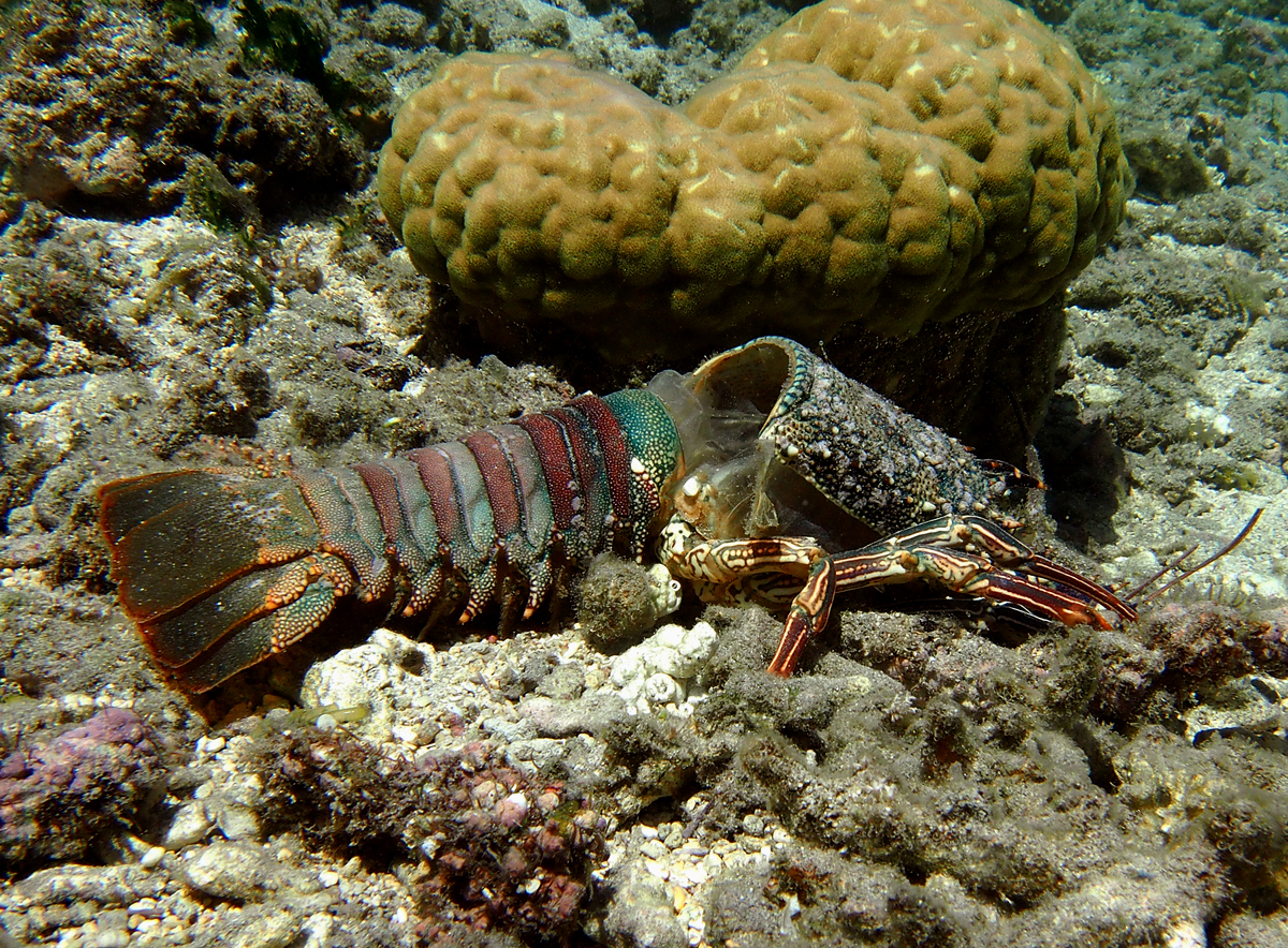 Exuvie ("mue") de langouste fourchette (Panulirus penicillatus) observée à faible profondeur dans un récif de la Réunion.